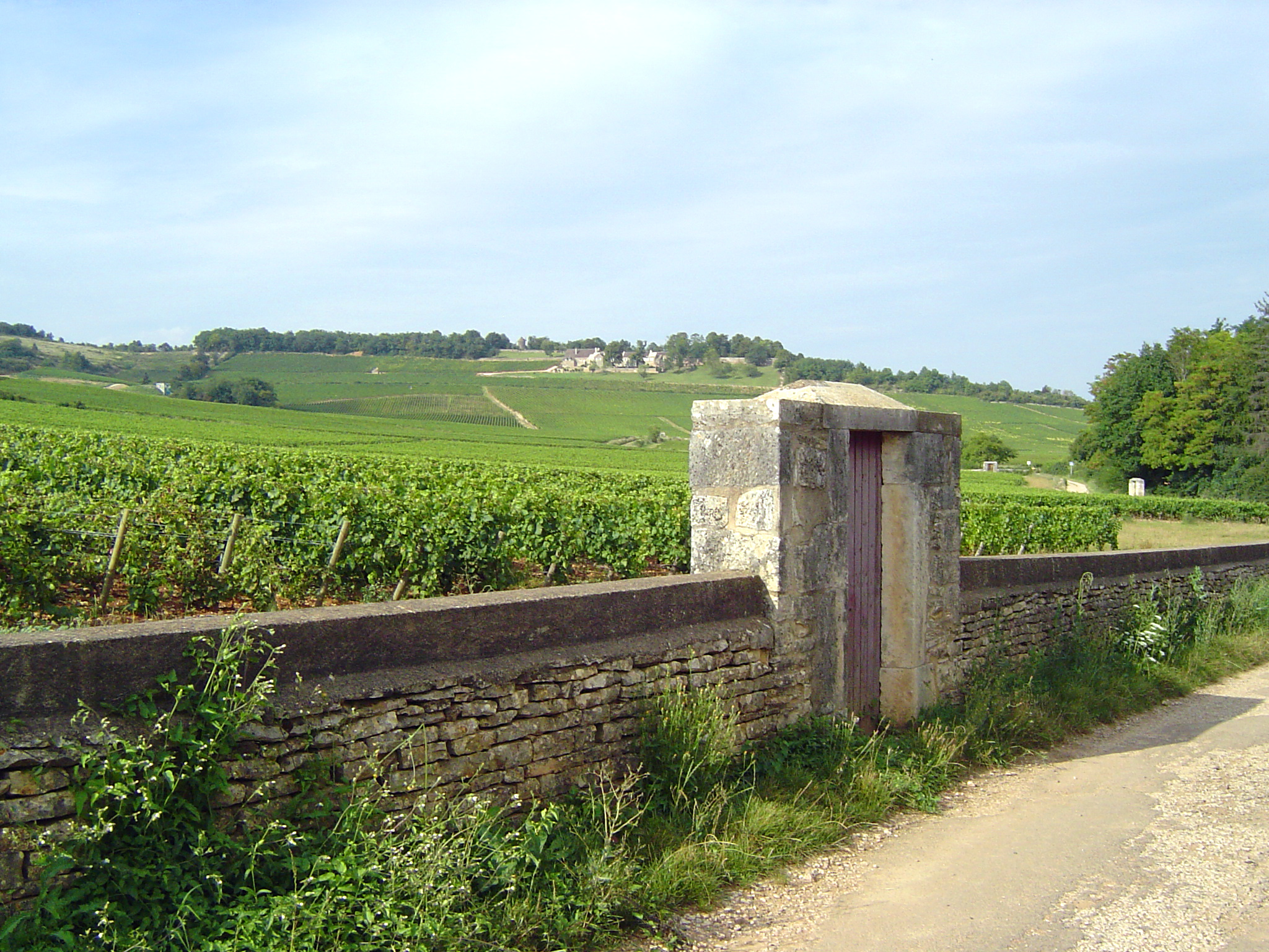 Givry (Saône et Loire) Vignes